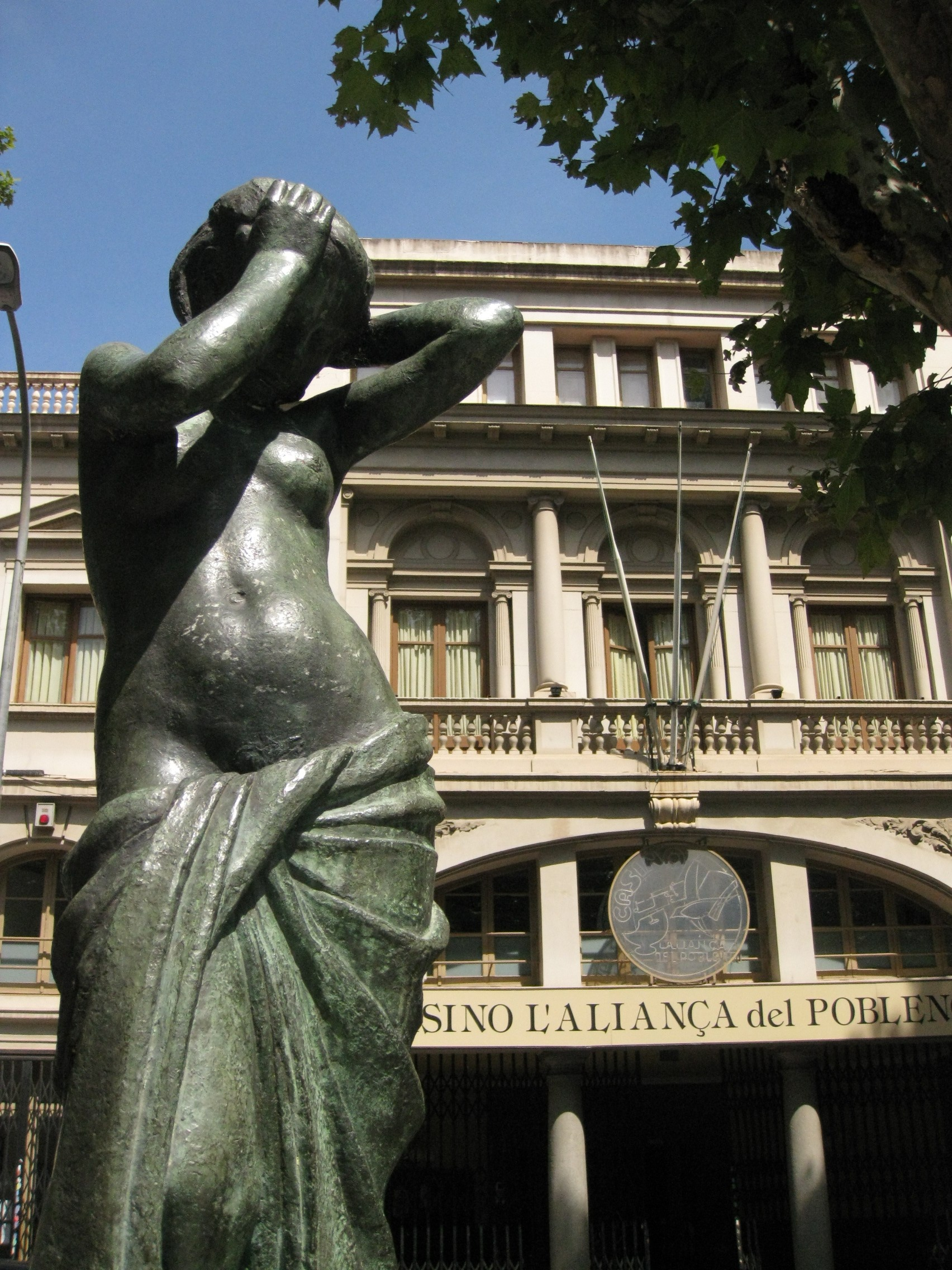 L'adolescent (Martí Llauradó). Rambla del Poblenou amb Ramon Turró (Barcelona)